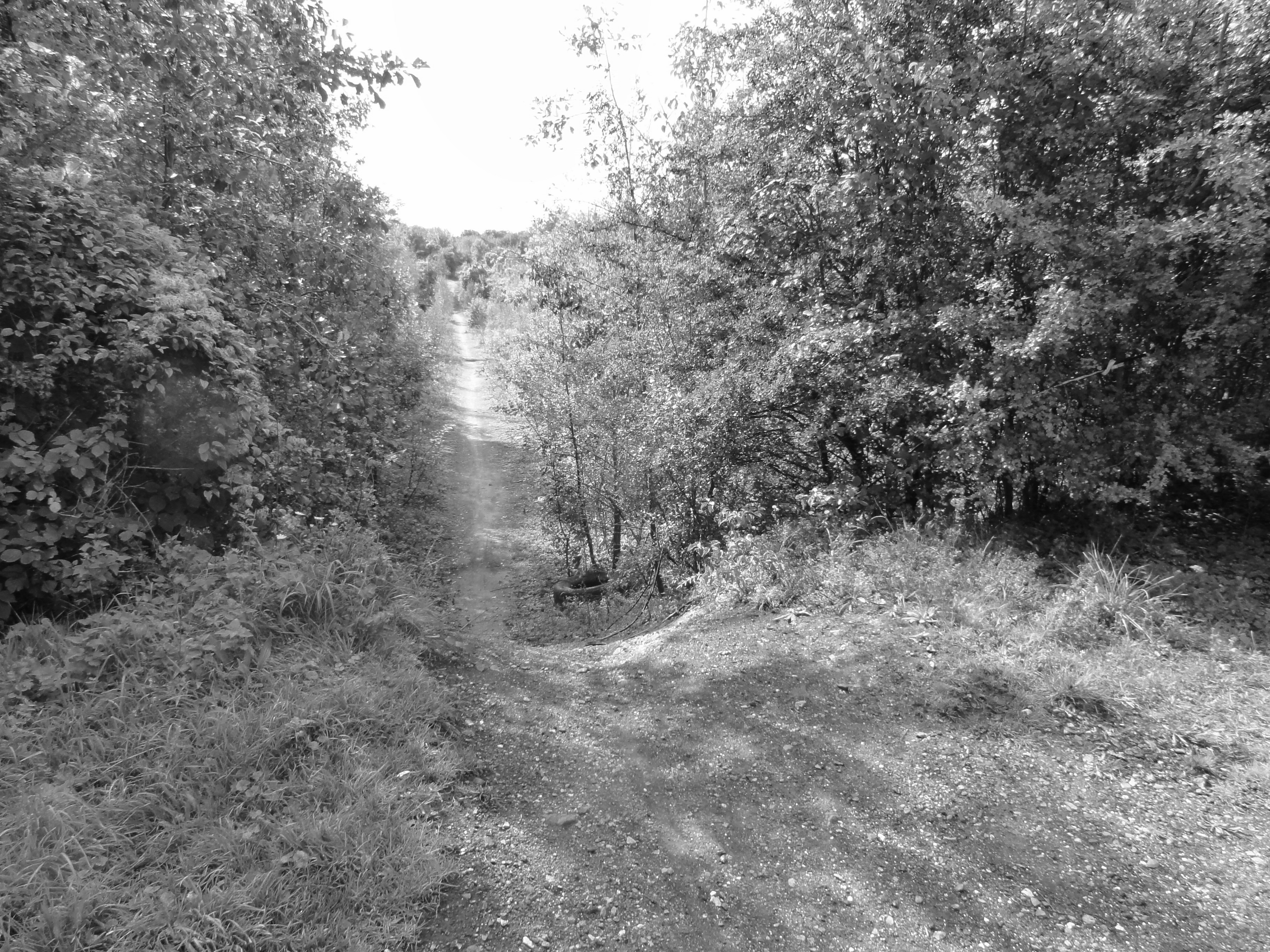 Terril n° 65A dit 10 de Béthune Ouest, Fosse n° 10 - 10 bis de la Compagnie des mines de Béthune, Sains-en-Gohelle, Pas-de-Calais, Nord-Pas-de-Calais, France.